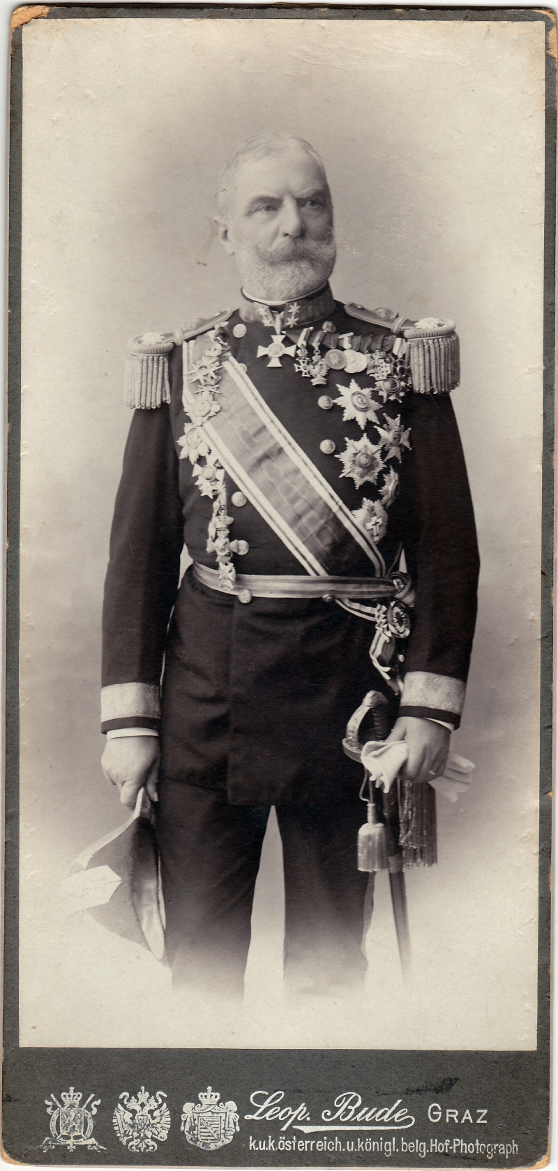 Vizeadmiral Moritz Sachs von Hellenau in Galauniform, wohl anlaesslich der Pensionierung 1905. Fotografie: Atelier Leopold Bude, Graz. Aufnahme vor 1907 (Todesjahr Leopold Budes) Fotos ist frei, Urheber mehr als 70 Jahre tot.